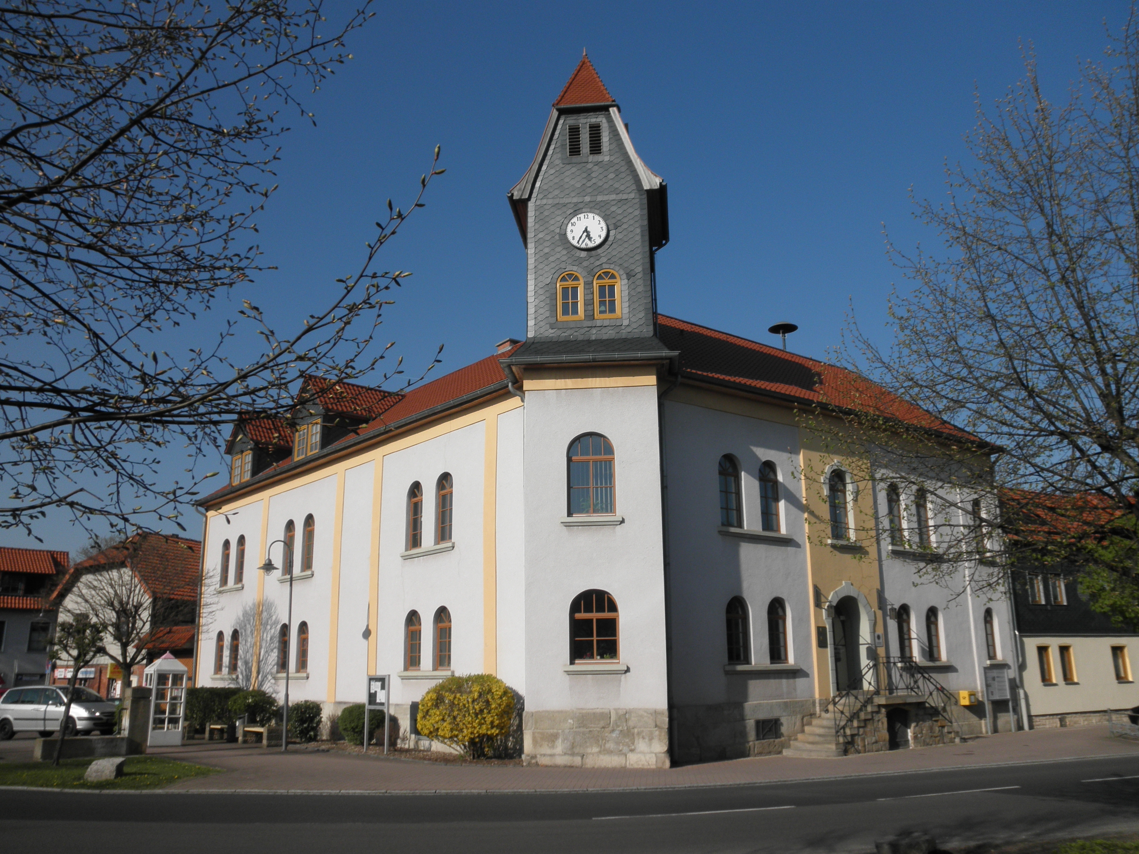 Rathaus in Grossengottern